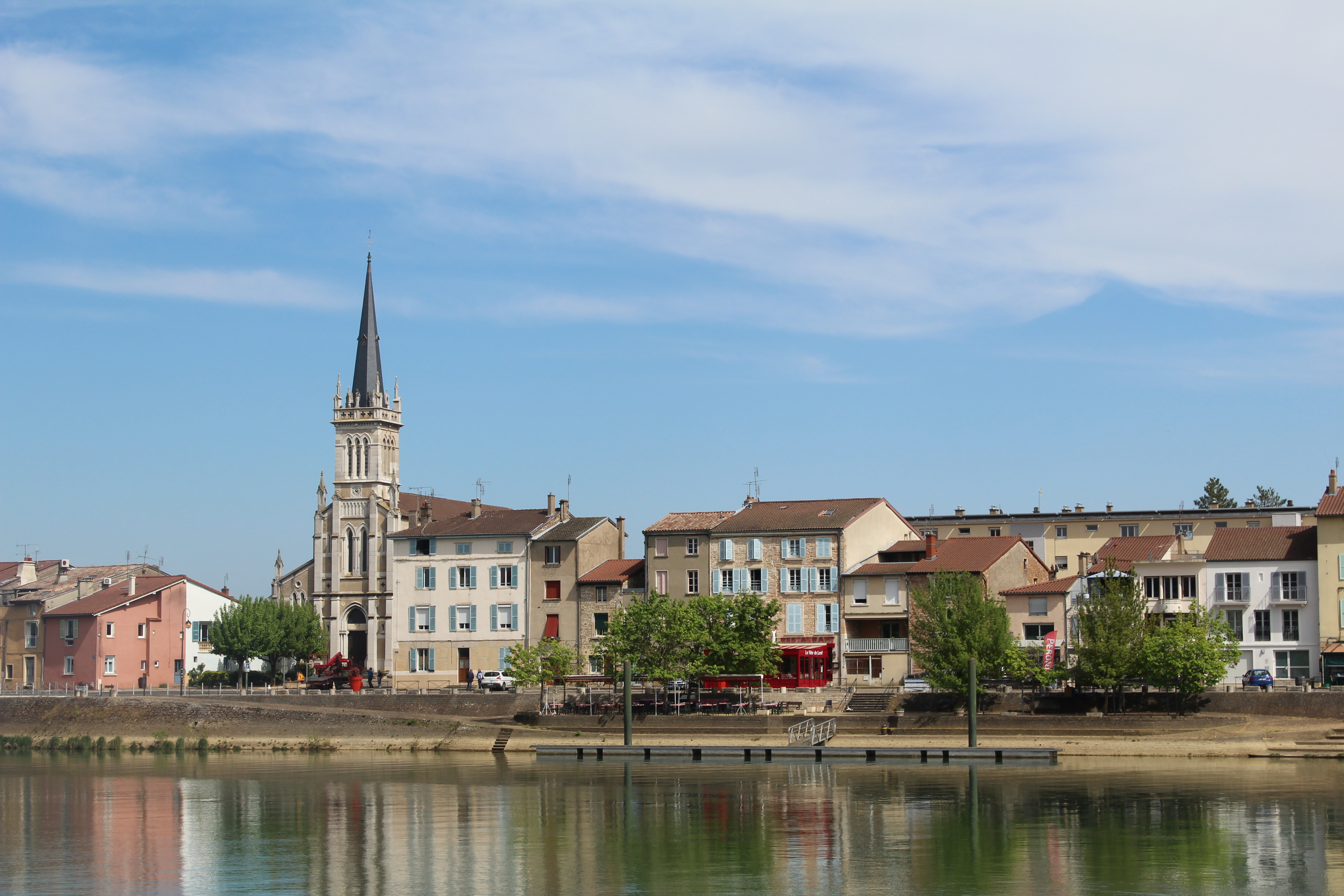 Vue sur la saône et l'église de Saint-Laurent-sur-Saône depuis la ville de Mâcon.